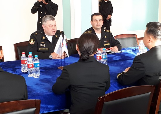 Заместитель командующего Тихоокеанским флотом контр-адмирал Денис Березовский во время встречи с офицерами ВМС и курсантами военных училищ Республики Корея